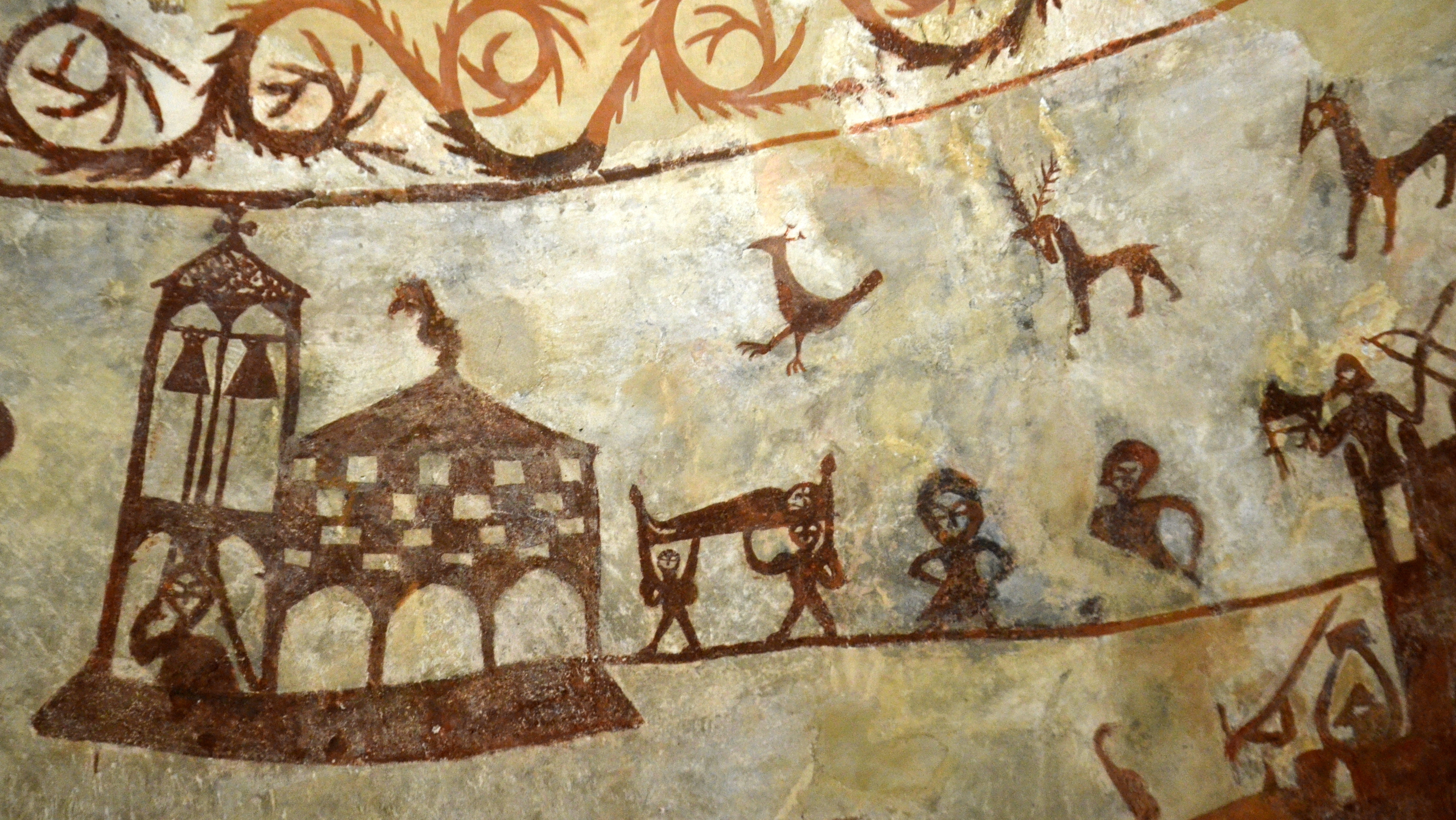 Alaitzako eliza erromanikoa, bere margolan ikusgarri bezain bereziekin.